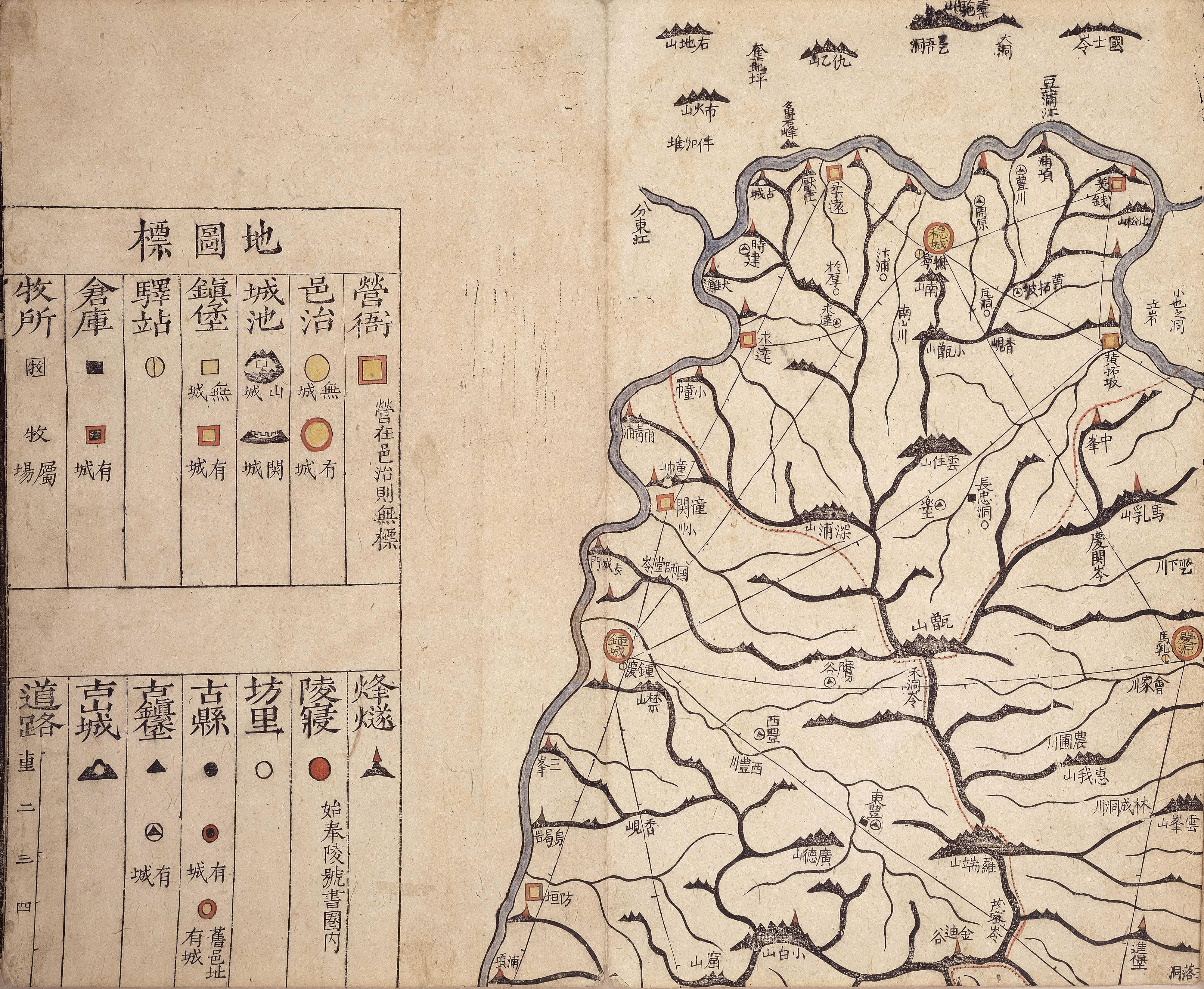 대동여지도